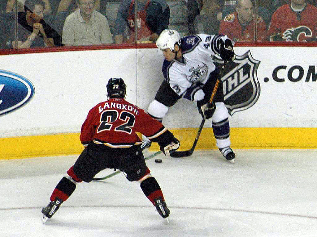 Partido de los Calgary Flames. Mike Weaver battling for the puck against Daymond Langkow, December 21, 2005